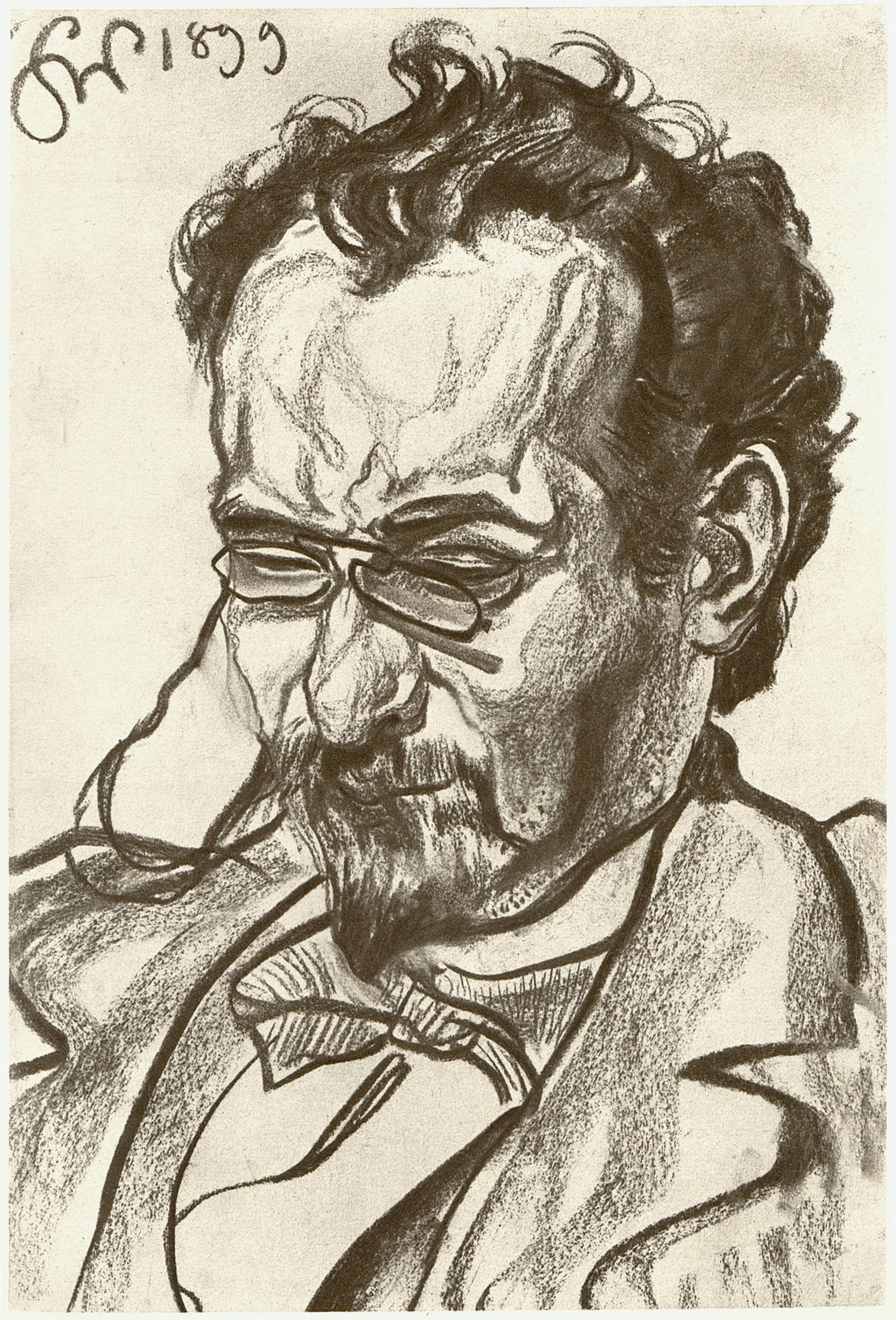 Wyspiański - Dzieła malarskie - Portret A. Langego. Rys. węgl. (r. 1899).